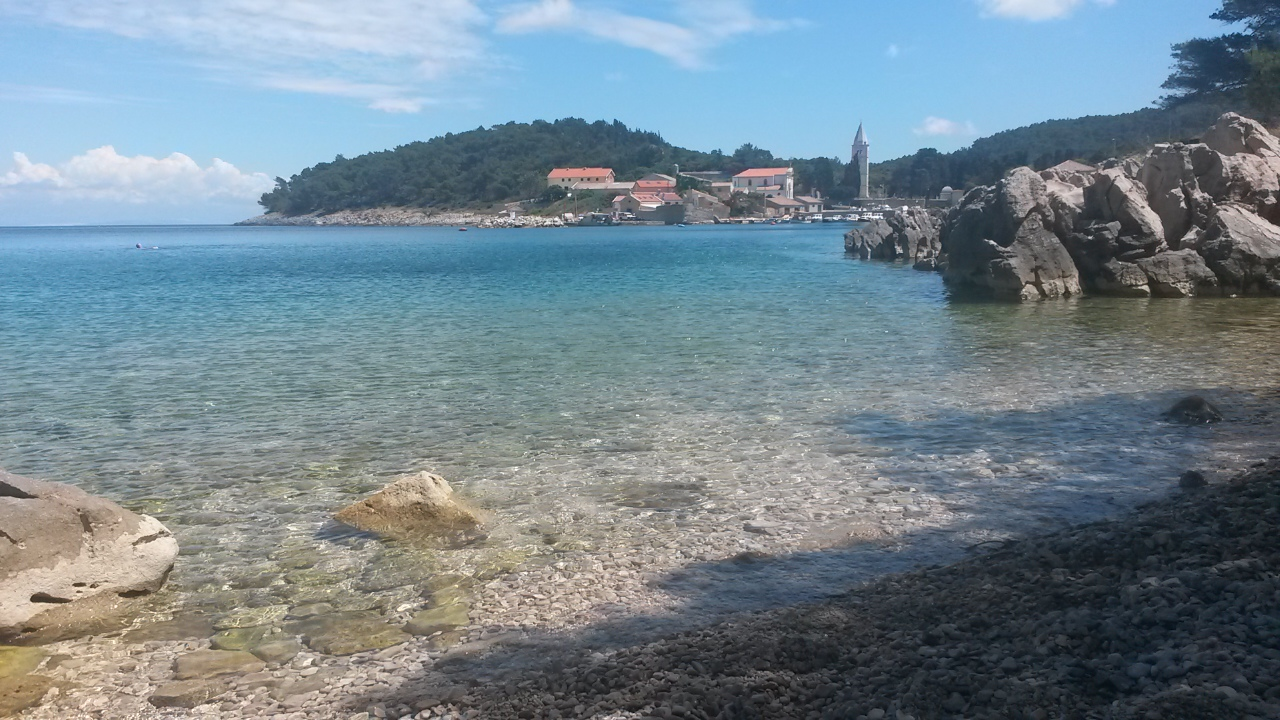 Zaliv pod borovci, Mali Lošinj. Slikano 4. junija, avtor: Katja Ravnikar.